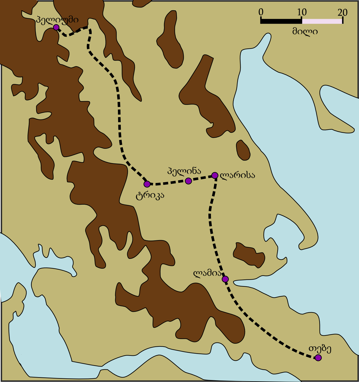 წიგნის ილუსტრაცია ჯეიმს ეშლი - მაკედონიის იმპერია: ფილიპე II-ისა და ალექსანდრე დიდის ომები, ძვ. წ. 359-323, გვ.176